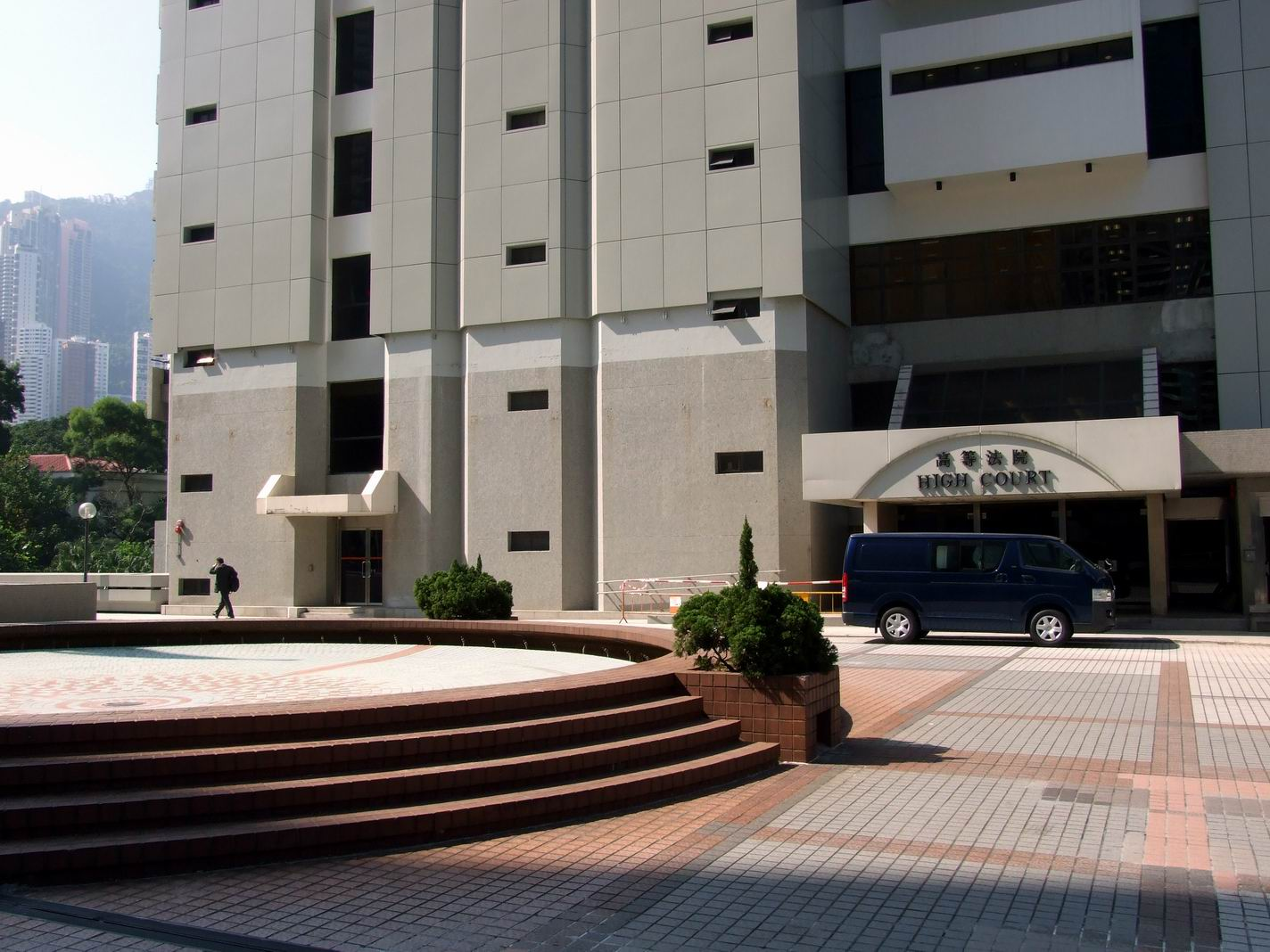 香港高等法院入口